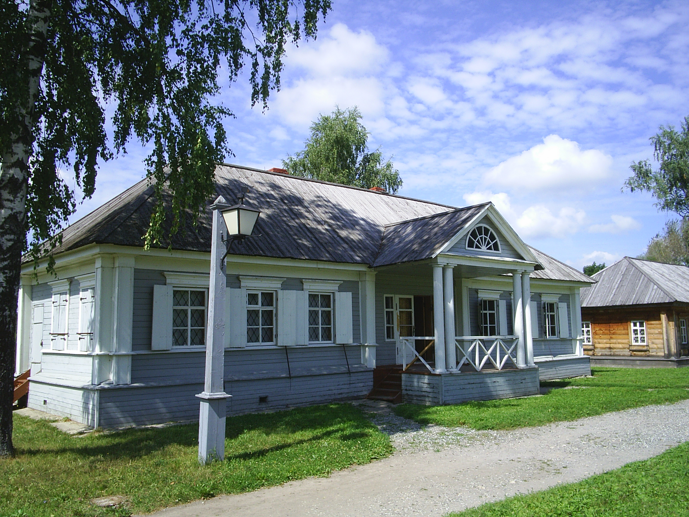 Большое Болдино. Музей А. С. Пушкина, "Попов порядок".